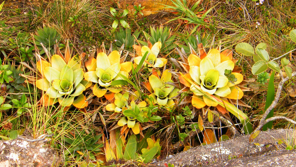 Bromelias, mount Roraima, Venezuela